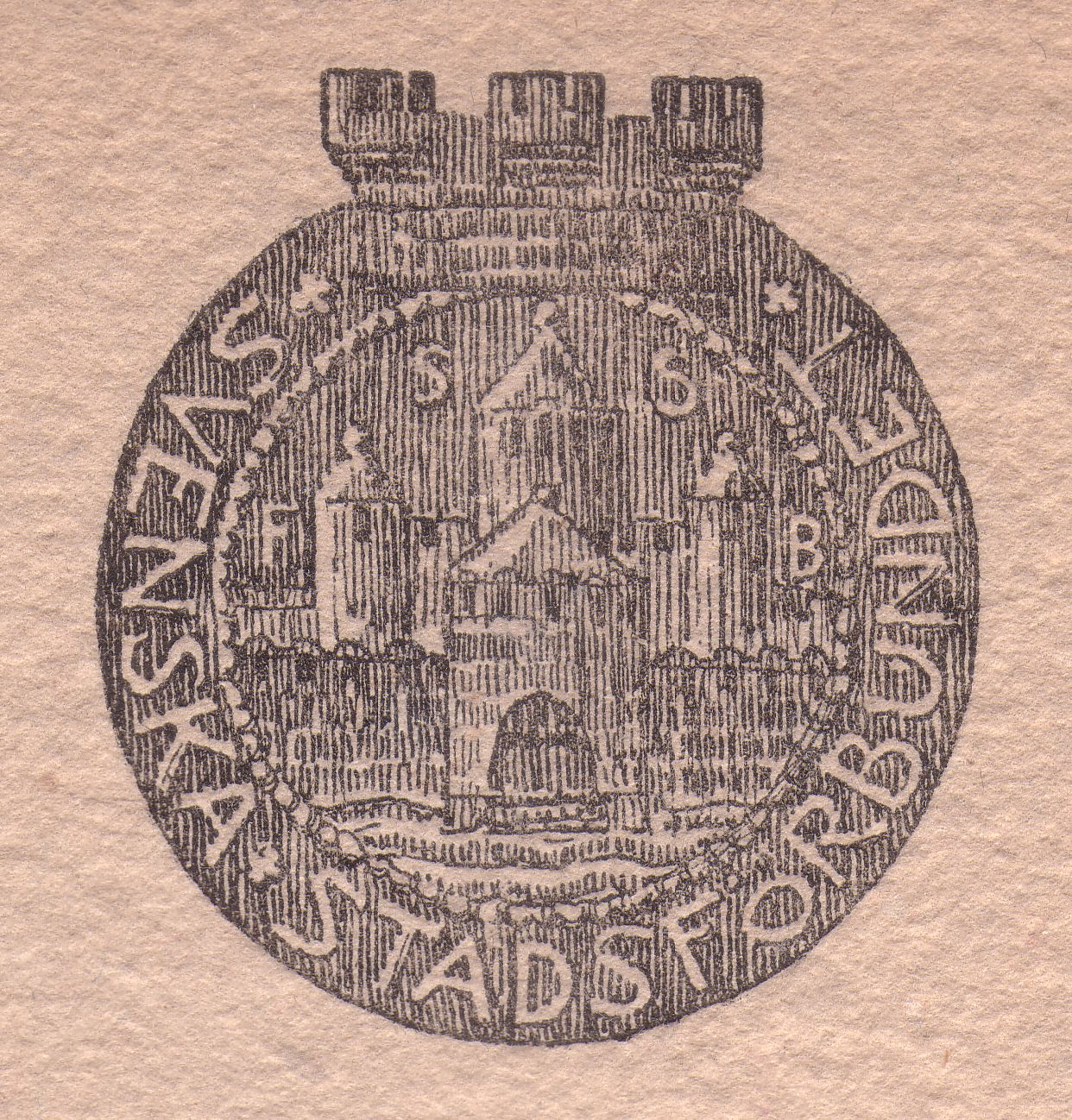 Svenska stadsförbundets logotyp. Jämför Stockholms medeltida sigill.